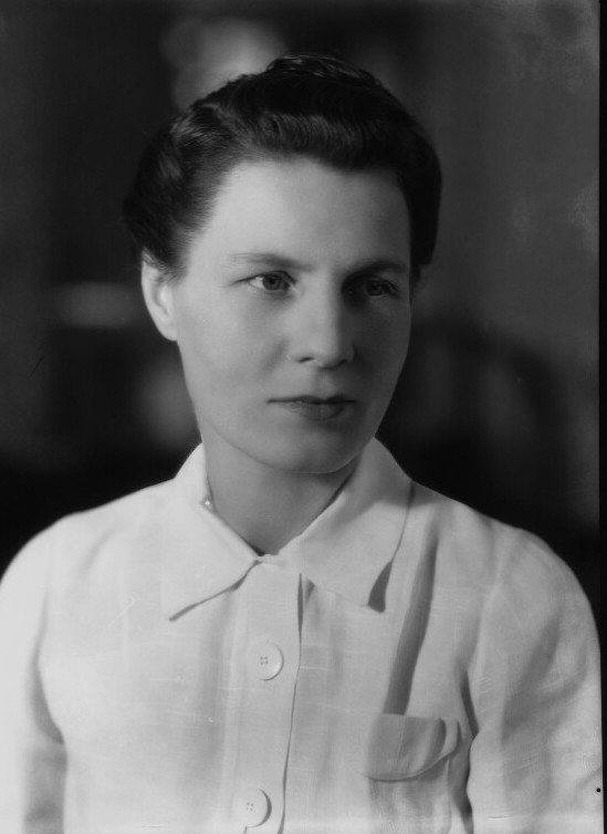 Baroness Summerskill